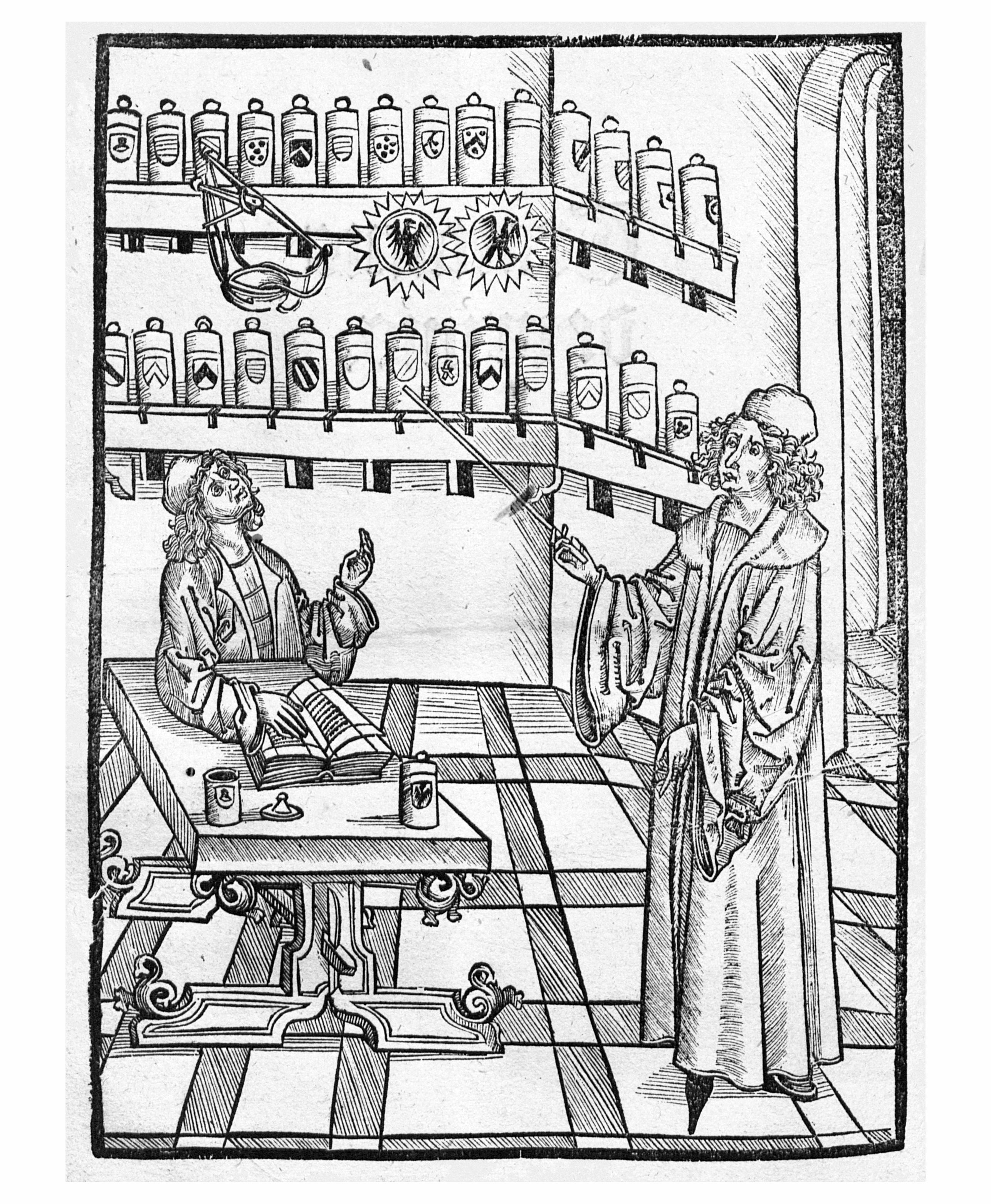 Holzschnitt